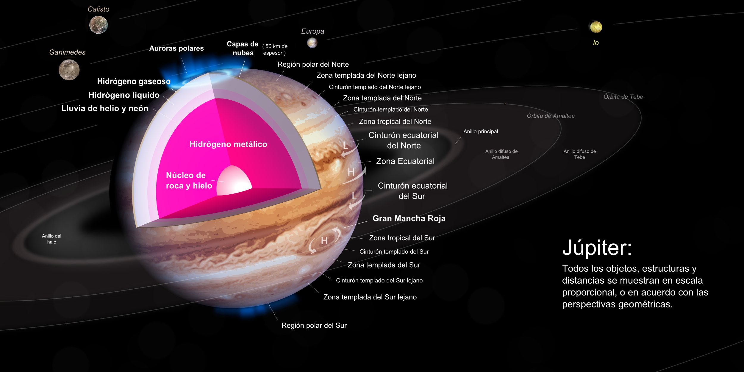 Diagrama de Júpiter